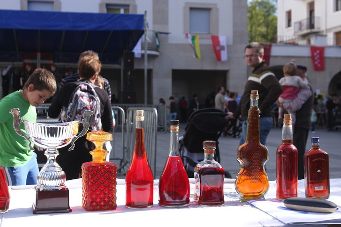 Aretxabaletako patxaran lehiaketako partehartzaileak